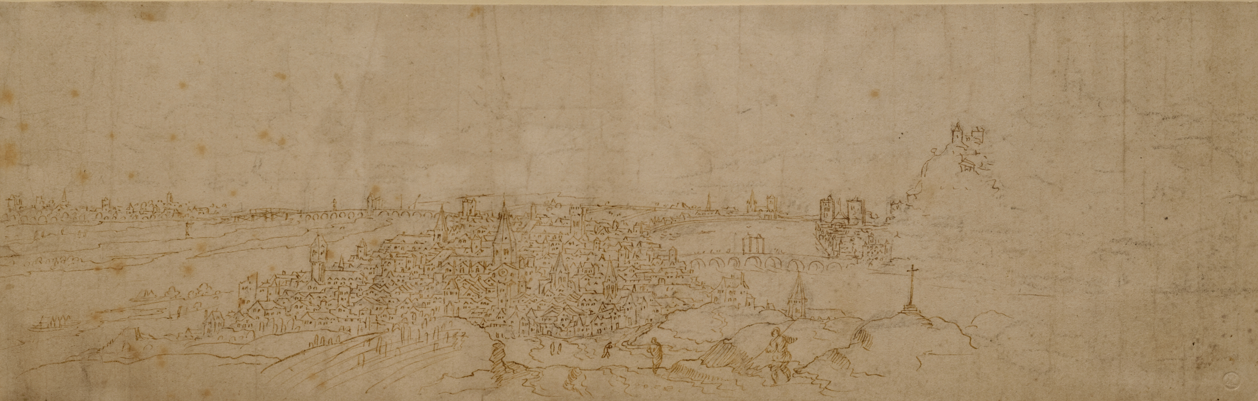 Vue panoramique de Lyon, en direction du sud depuis la montée Saint Sébastien. Plume, encre brune et aquarelle